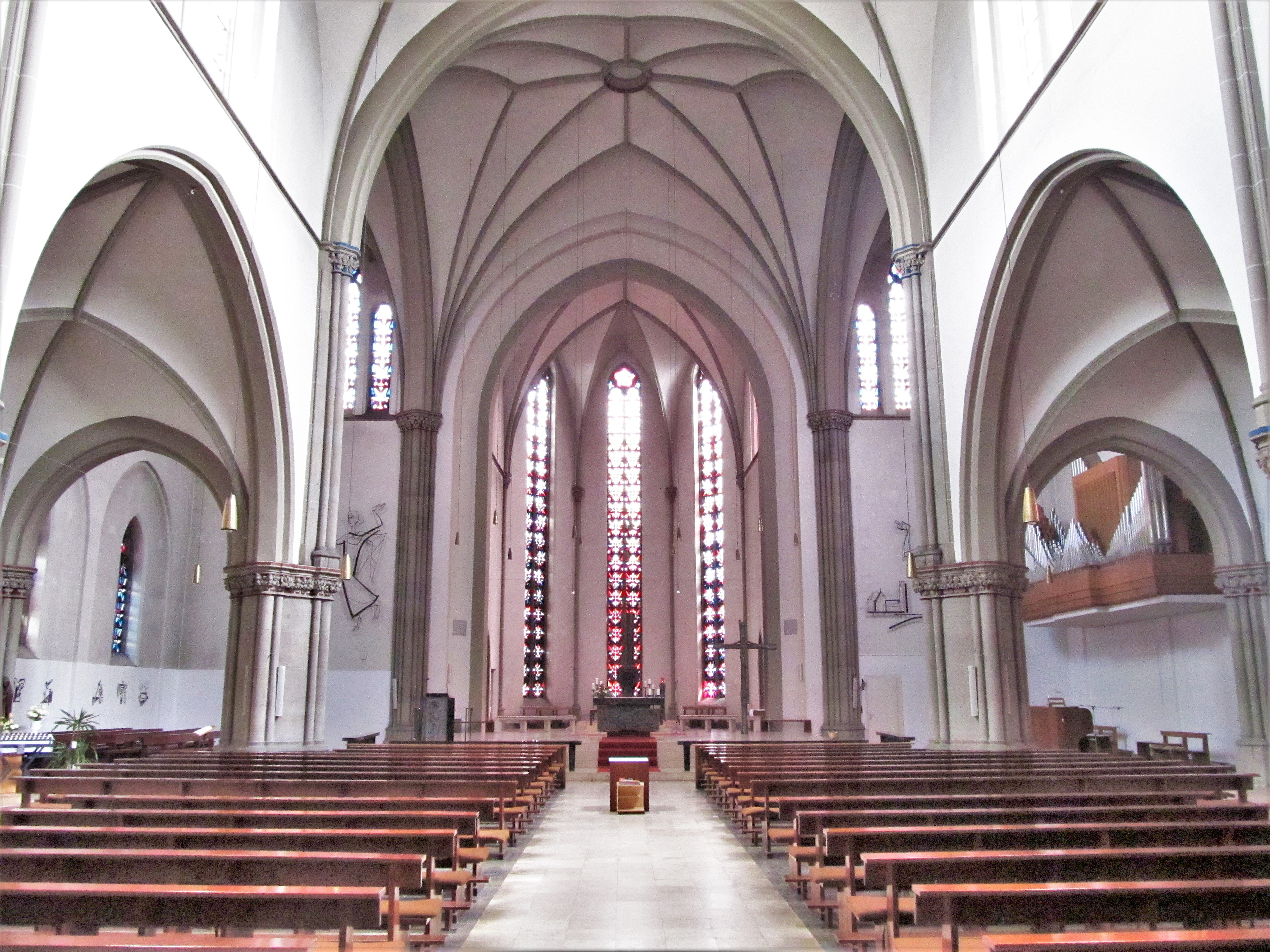 Blick ins Innere der katholischen Pfarrkirche St. Josef in Saarbrücken-Malstatt, Saarland